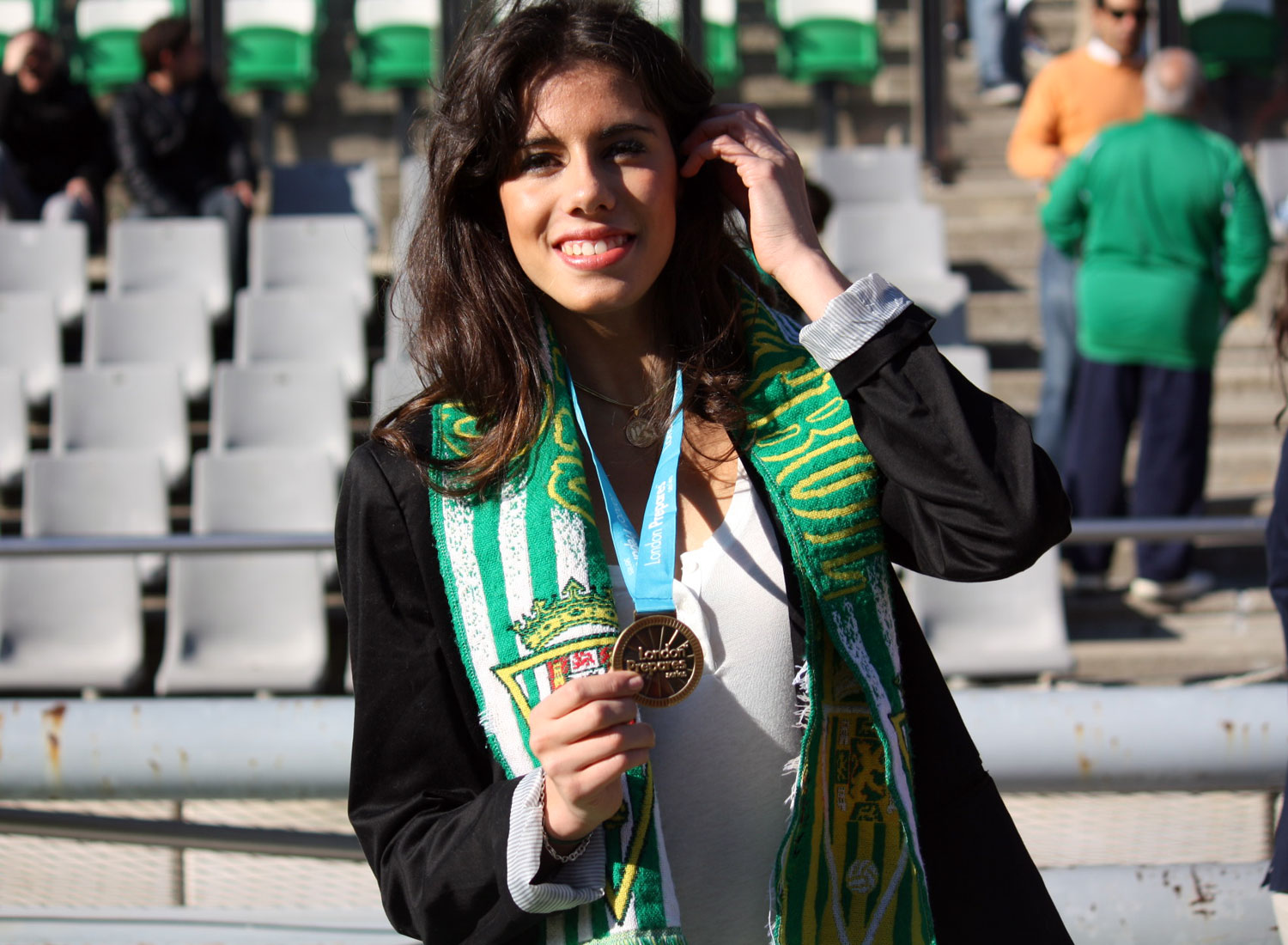 La gimnasta rítmica española Lourdes Mohedano mostrando la medalla de oro que consiguió en el Preolímpico de Londres, durante un partido de fútbol entre el Córdoba CF y el Celta de Vigo el 22 de enero de 2012, en el que realizó el saque de honor.